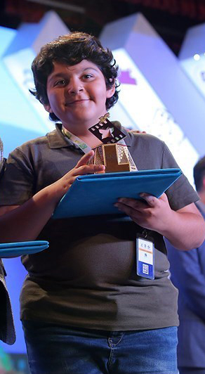 سامیار محمدی در اختتامیه سی ویکمین جشنواره بین المللی فیلمهای کودکان و نوجوانان ۱۴ شهريور ۱۳۹۷